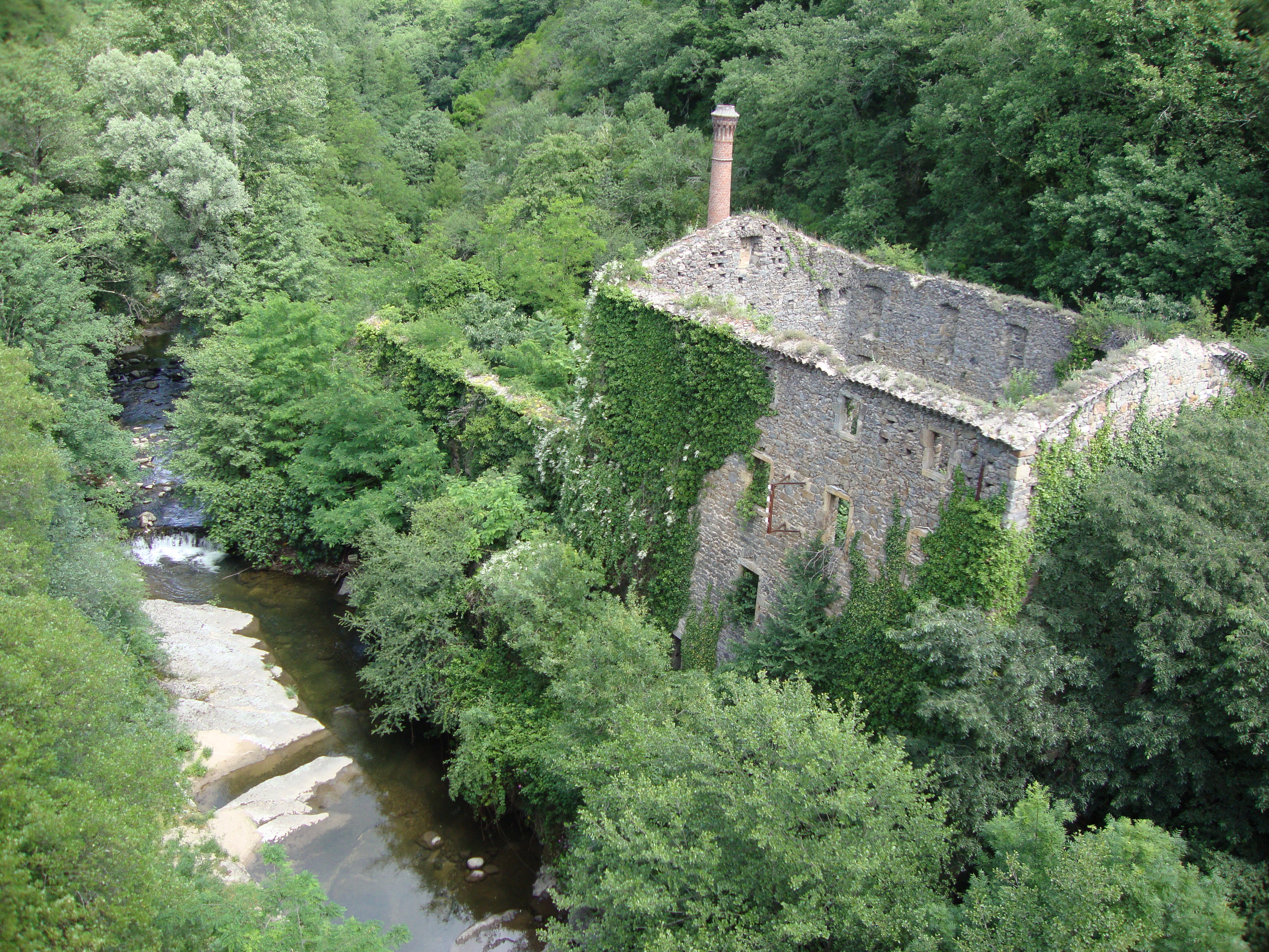 Privas (Ardèche, Fr) Le Mézayon avec moulin en ruine